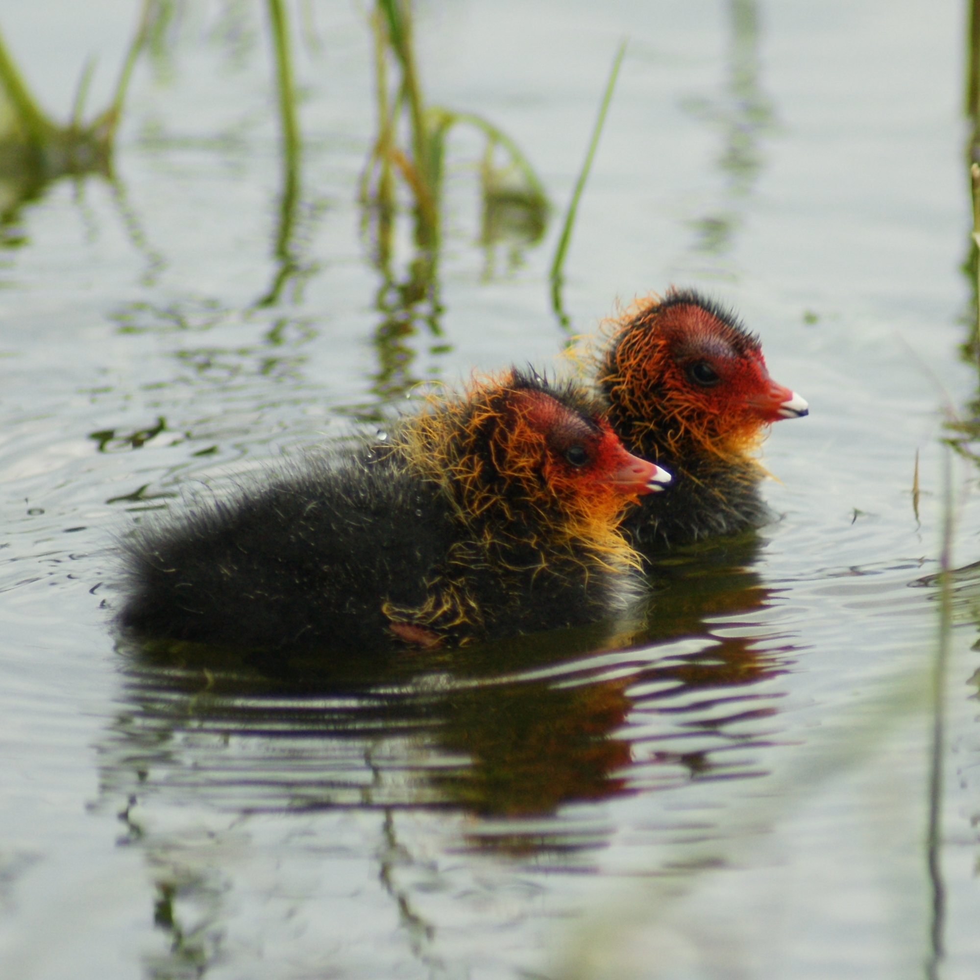 Das Blässhuhn (Fulica atra) ist eine Art aus der Familie der Rallenvögel. Gesehen im Harder Strandbad am Bodensee.